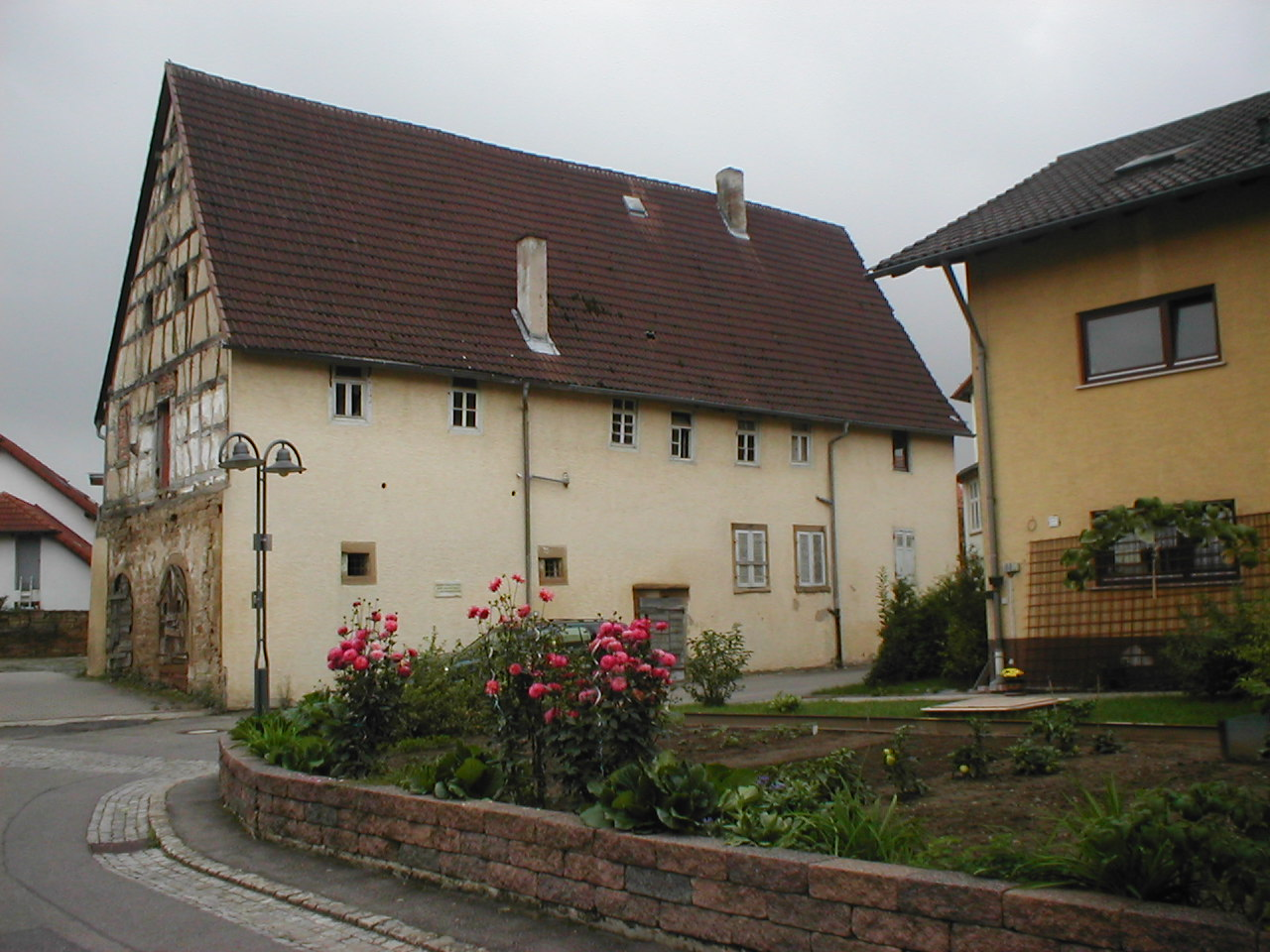 Gartengrundstück in der Mühlgasse in Ittlingen. Hier stand bis 1938 die Synagoge des Ortes. Am Gebäude im Hintergrund befindet sich eine Synagogen-Gedenktafel.